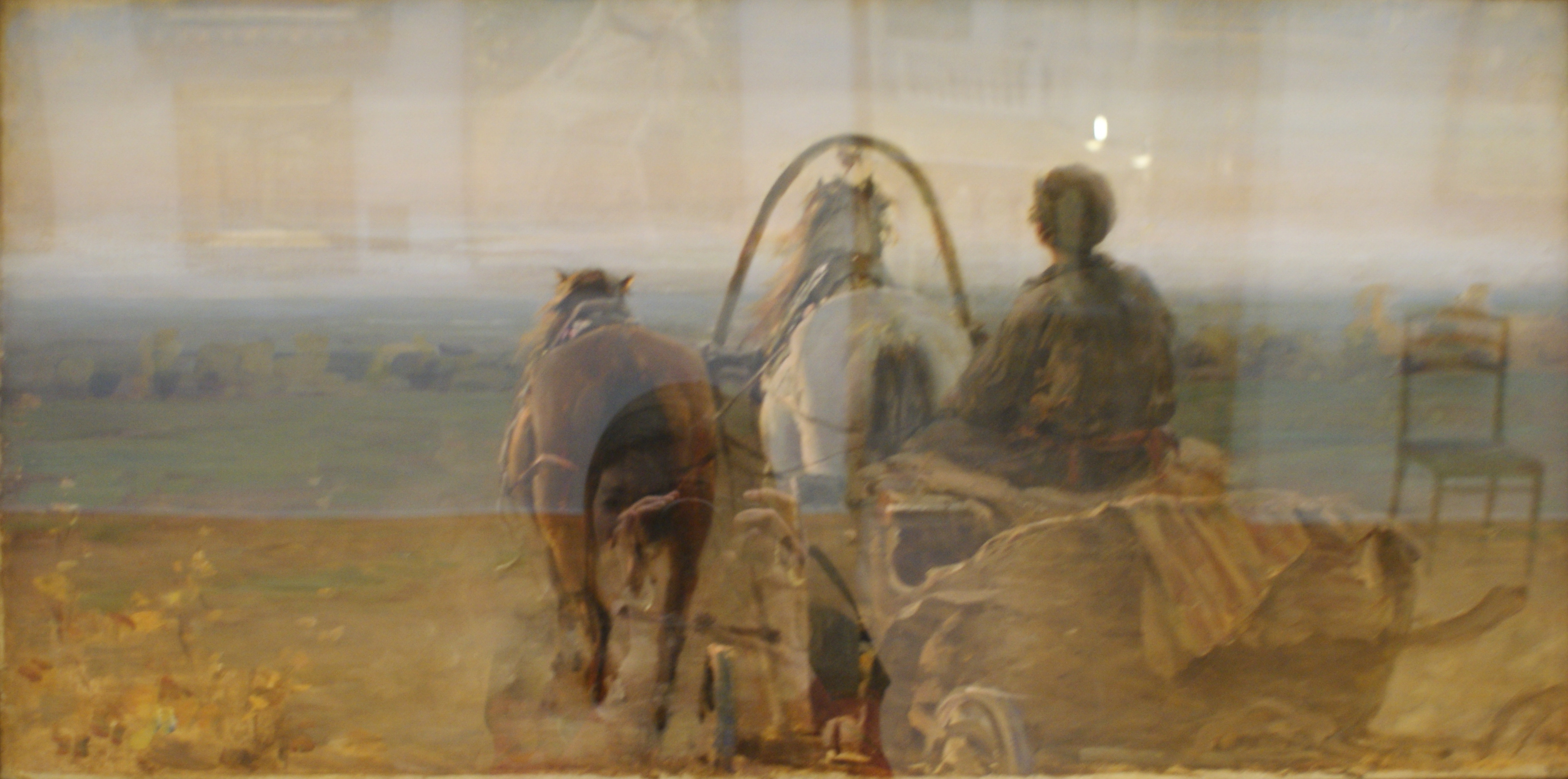 Зваротны, Палатно, алей